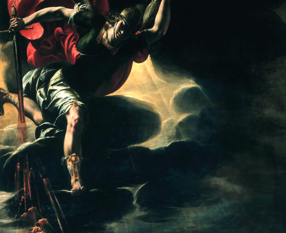 Battaglia di Sennacherib (dettaglio)